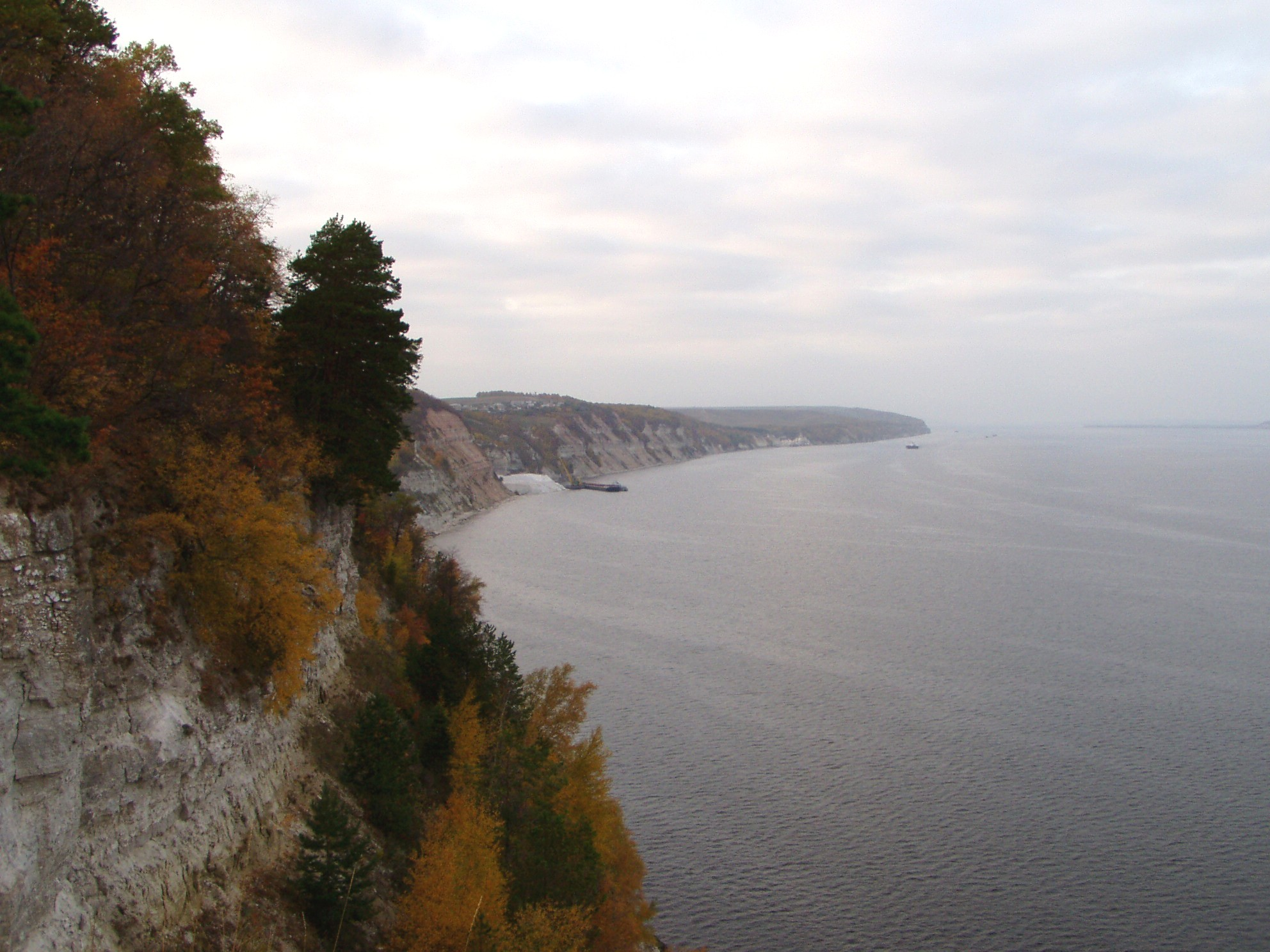 Kama mouth - Камское устье - Кама тамагы; The Gypsum Mine